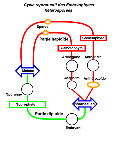 cycle reproductif des embryophytes